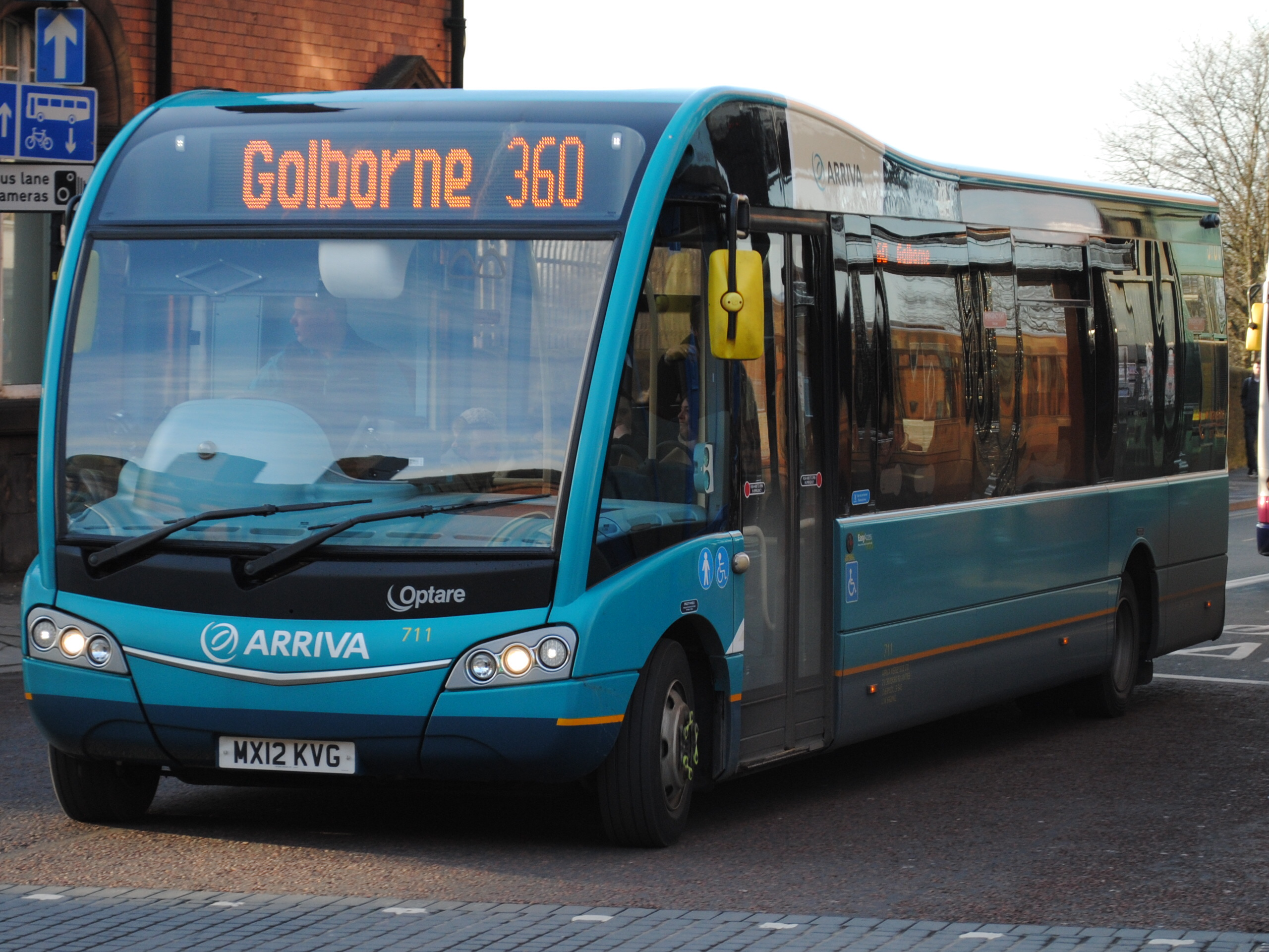 Optare Solo M920 SR